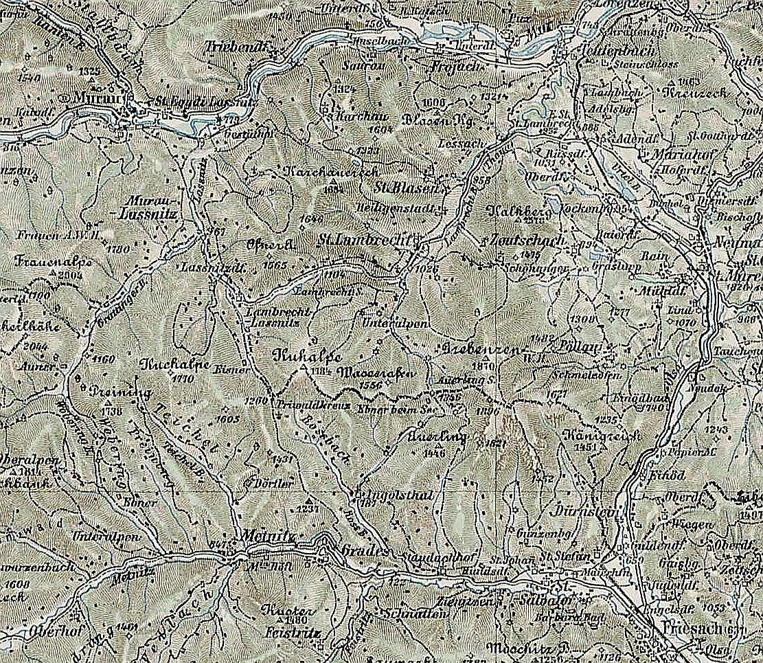 Murauer Laßnitz. Gebiet zwischen Mur, Mettnitz und Friesach in der Obersteiermark/Oberkärnten